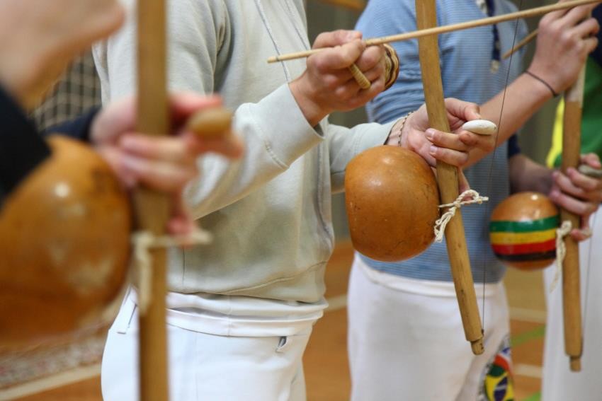 igra na berimbau